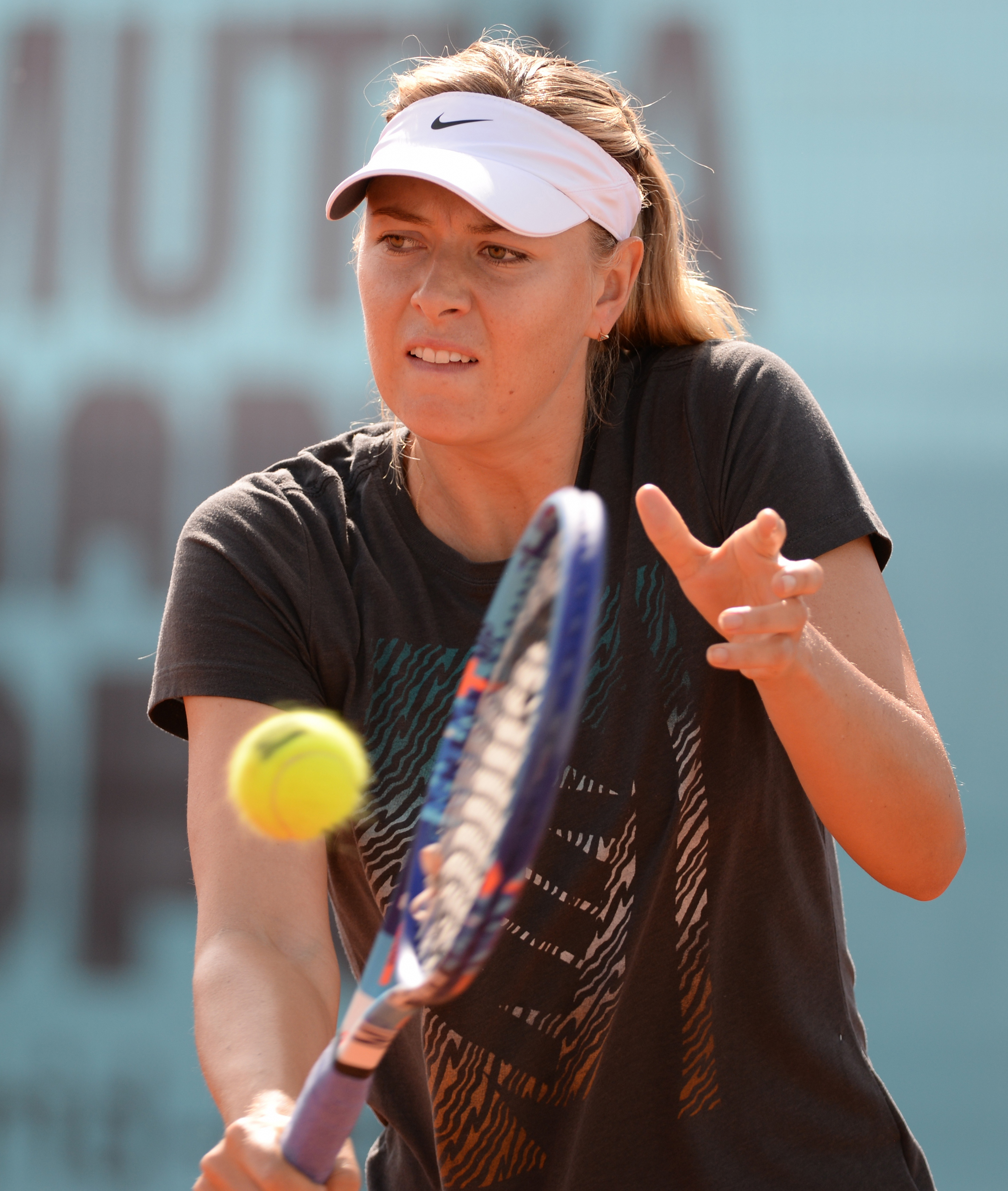 Maria Sharapova